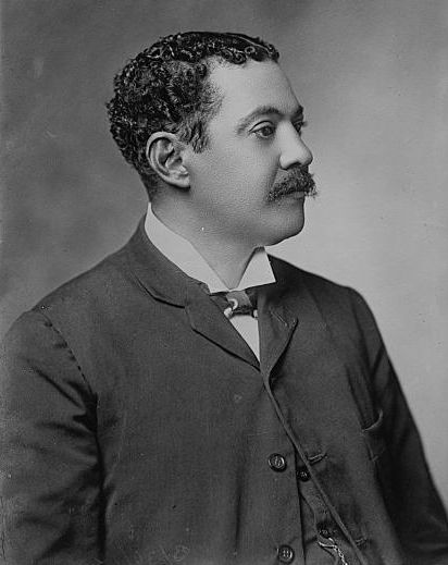 Carlos Antonio Mendoza (1856-1916), President of Panama